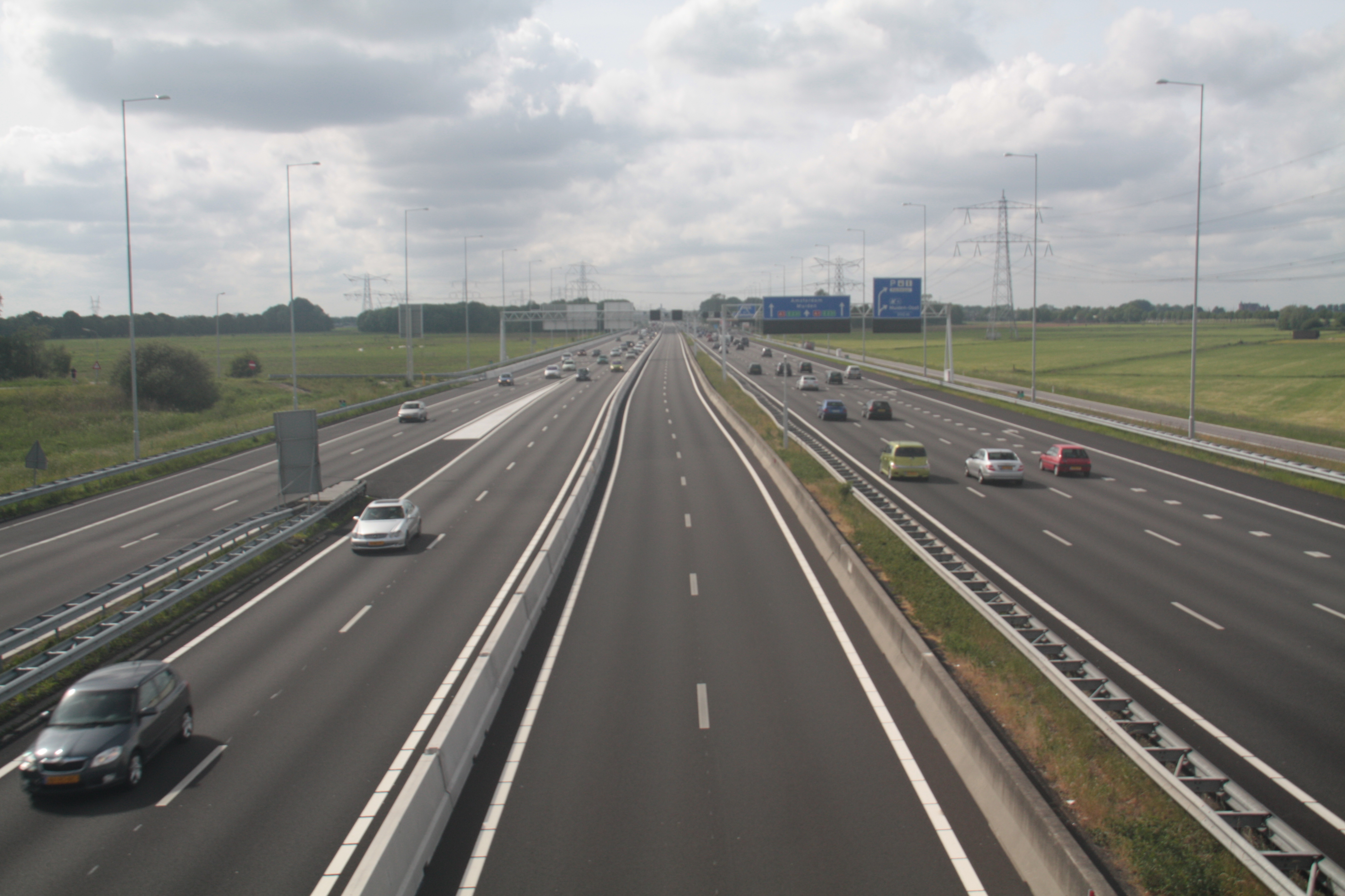 De wisselstrook in het midden van de Rijksweg 1.